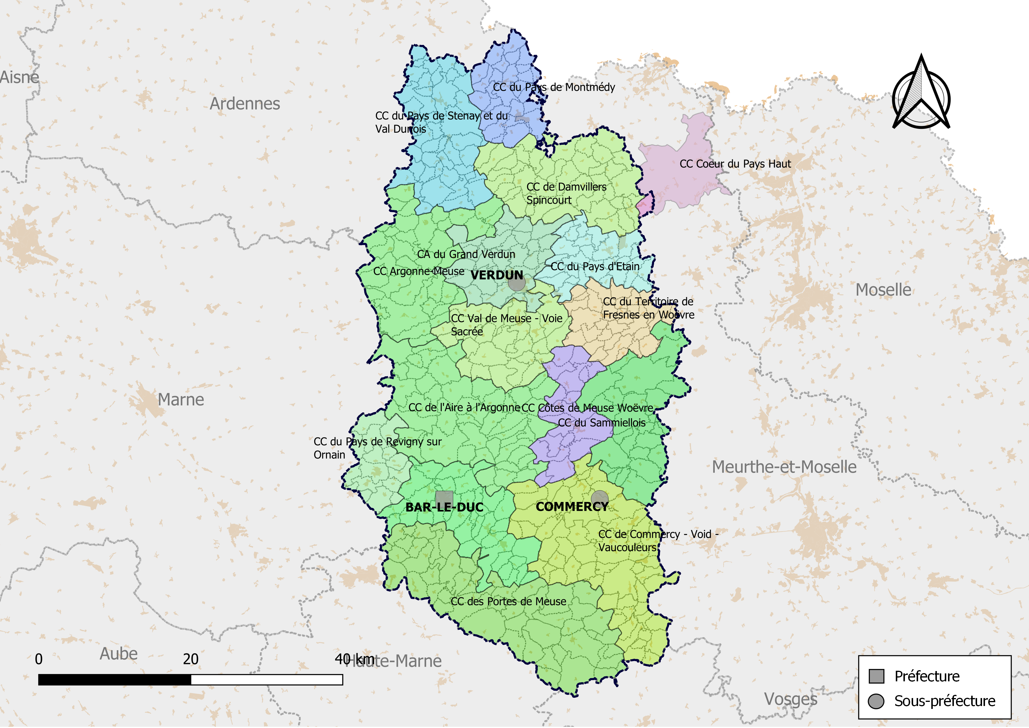 Carte des intercommunalités du département de la Meuse, France. Composition au 1er janvier 2019.